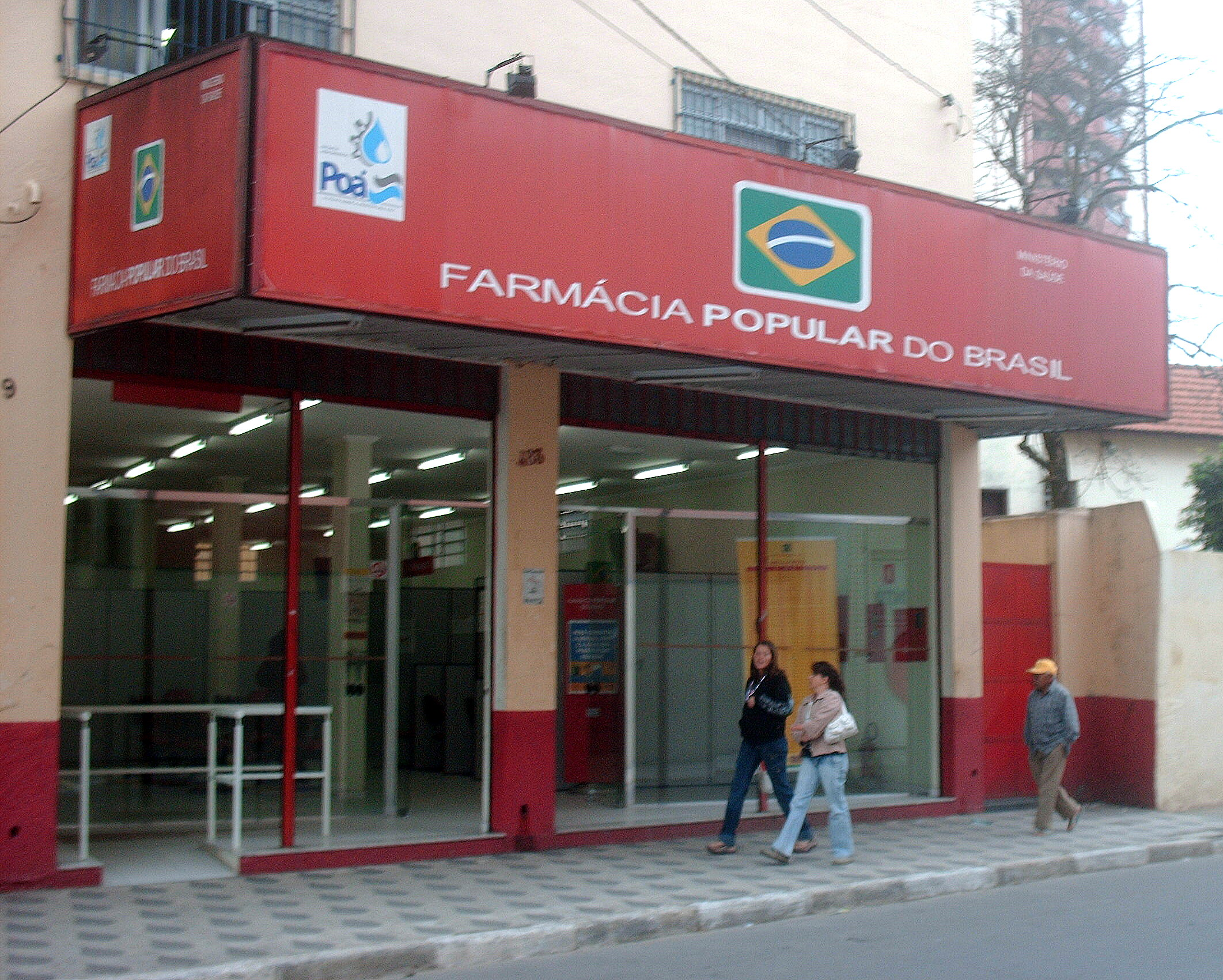 Farmácia Popular do Brasil, em Poá